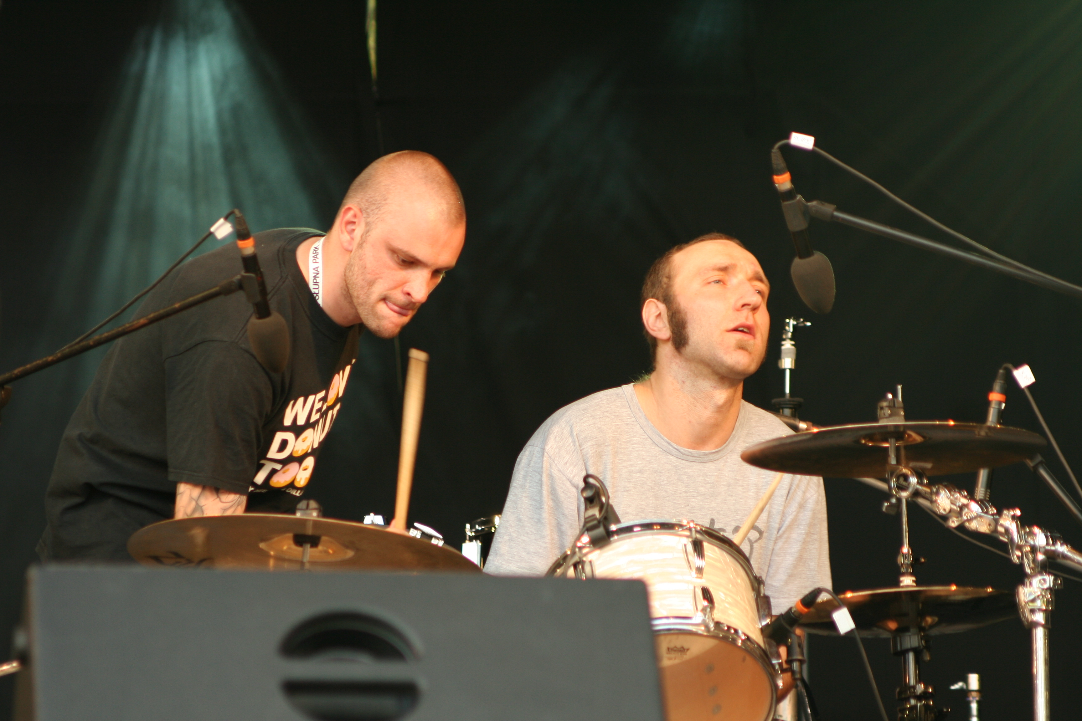 Bassisters Orchestra, Off Festival, Mysłowice. Emade i Macio Moretti.